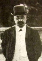 Pëtr Ivanovič Račkovskij (1851-1910)